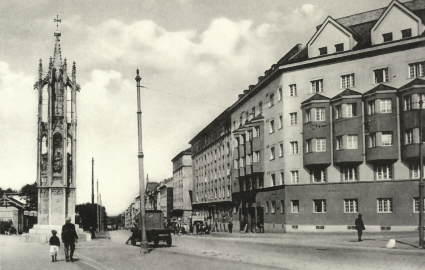 Triester Straße mit Spinnerin am Kreuz (1933), Wien-Favoriten